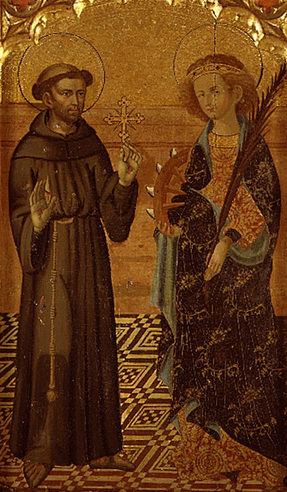 La obra representa a San Francisco de Asís, el fundador de la Orden de los franciscanos, y a la mártir Santa Catalina de Alejandría.